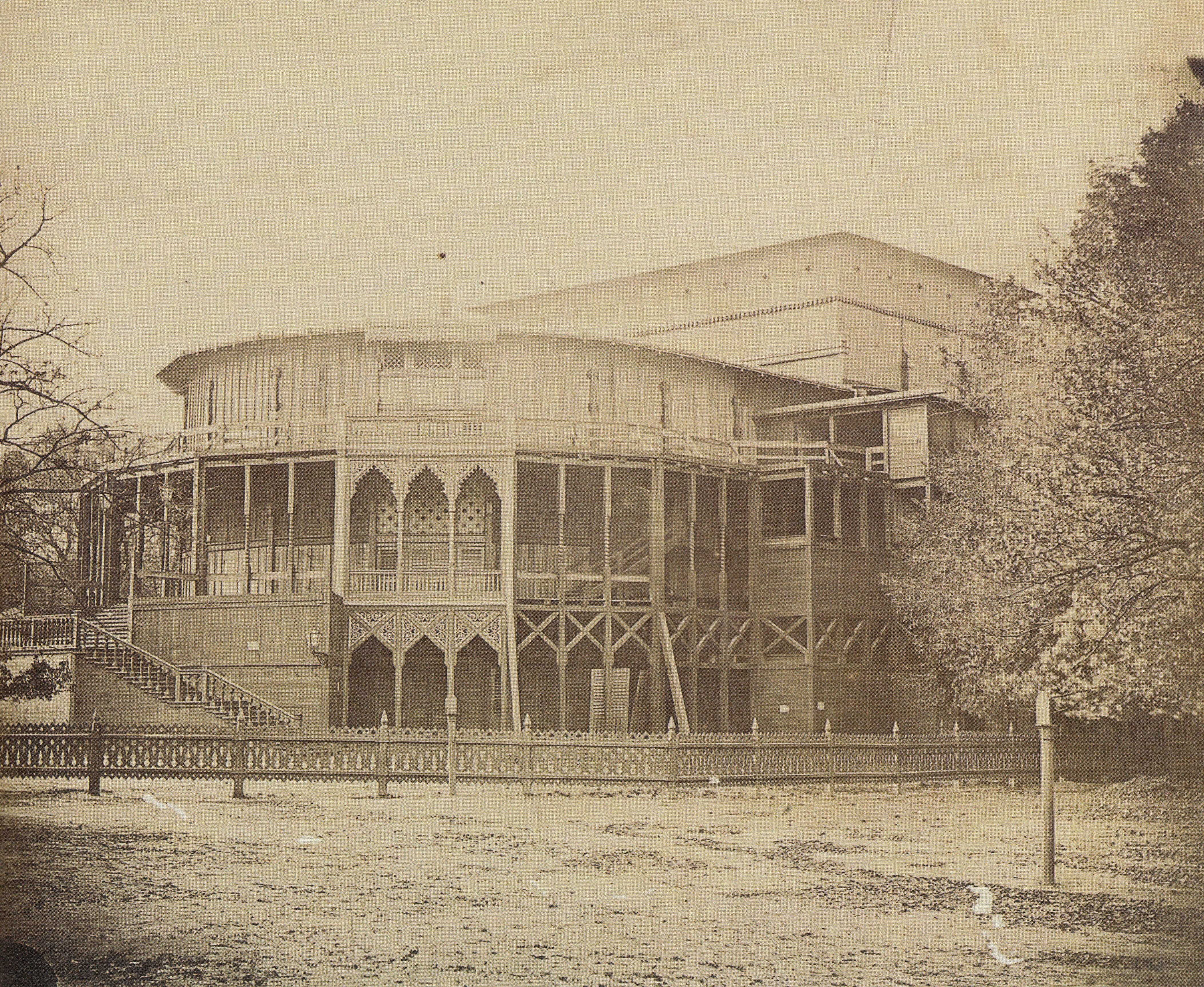 Teatr Letni w Ogrodzie Saskim w Warszawie